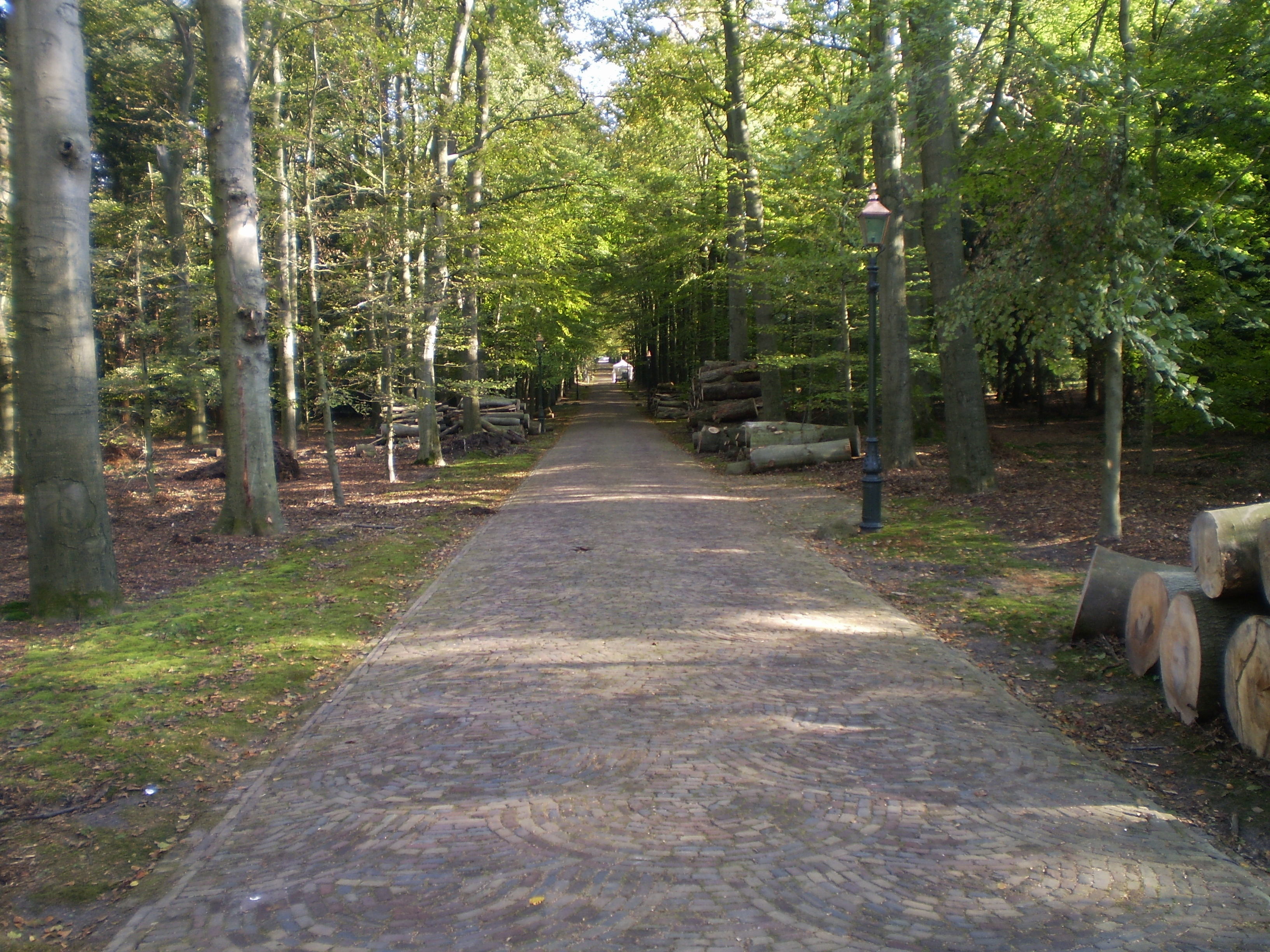 Oprijlaan De Palts met bestratingspatronen